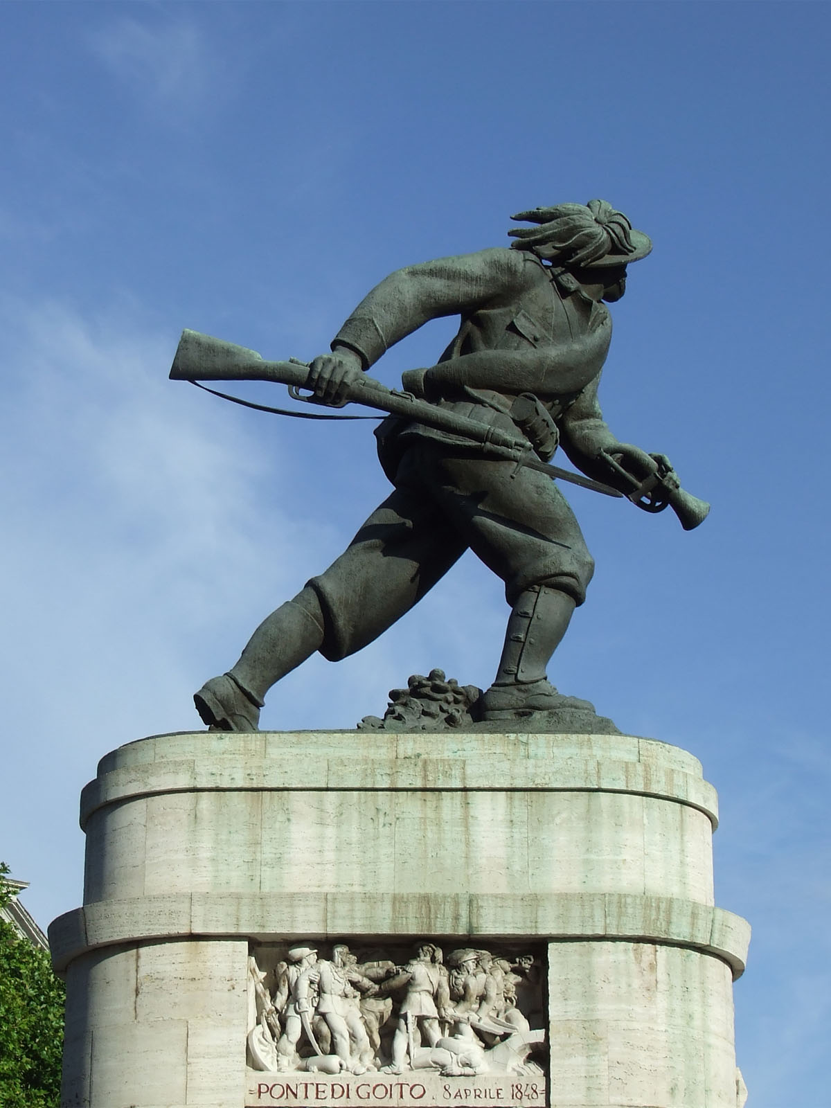 Monumento al Bersagliere, Roma, Piazza di Porta Pia. Il monumento è stato inaugurato in occasione del centenario dalla formazione della specialità, nel 1936. Il monumento è stato progettato dall'architetto Italo Mancini e realizzato dallo scultore Publio Morbiducci nel 1932.